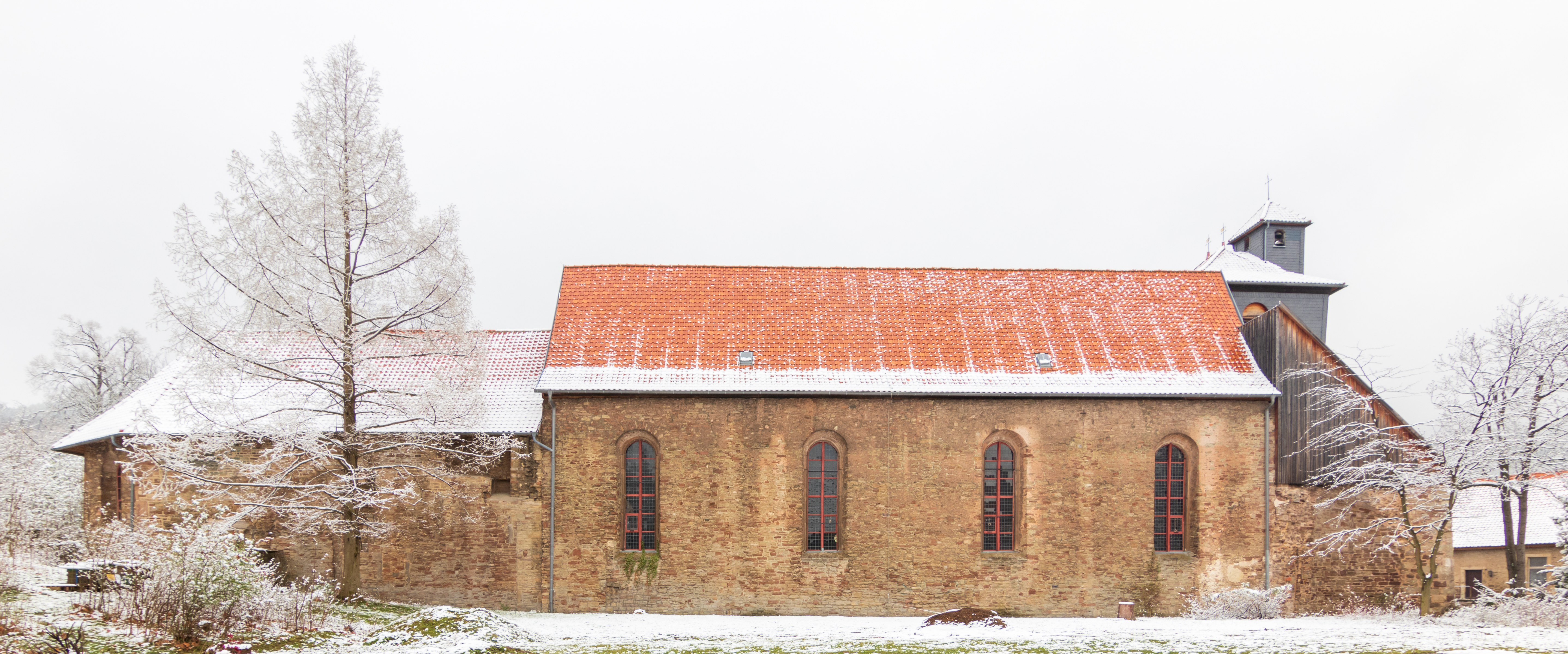 Kloster Ilsenburg vom Klosterteich aus gesehen